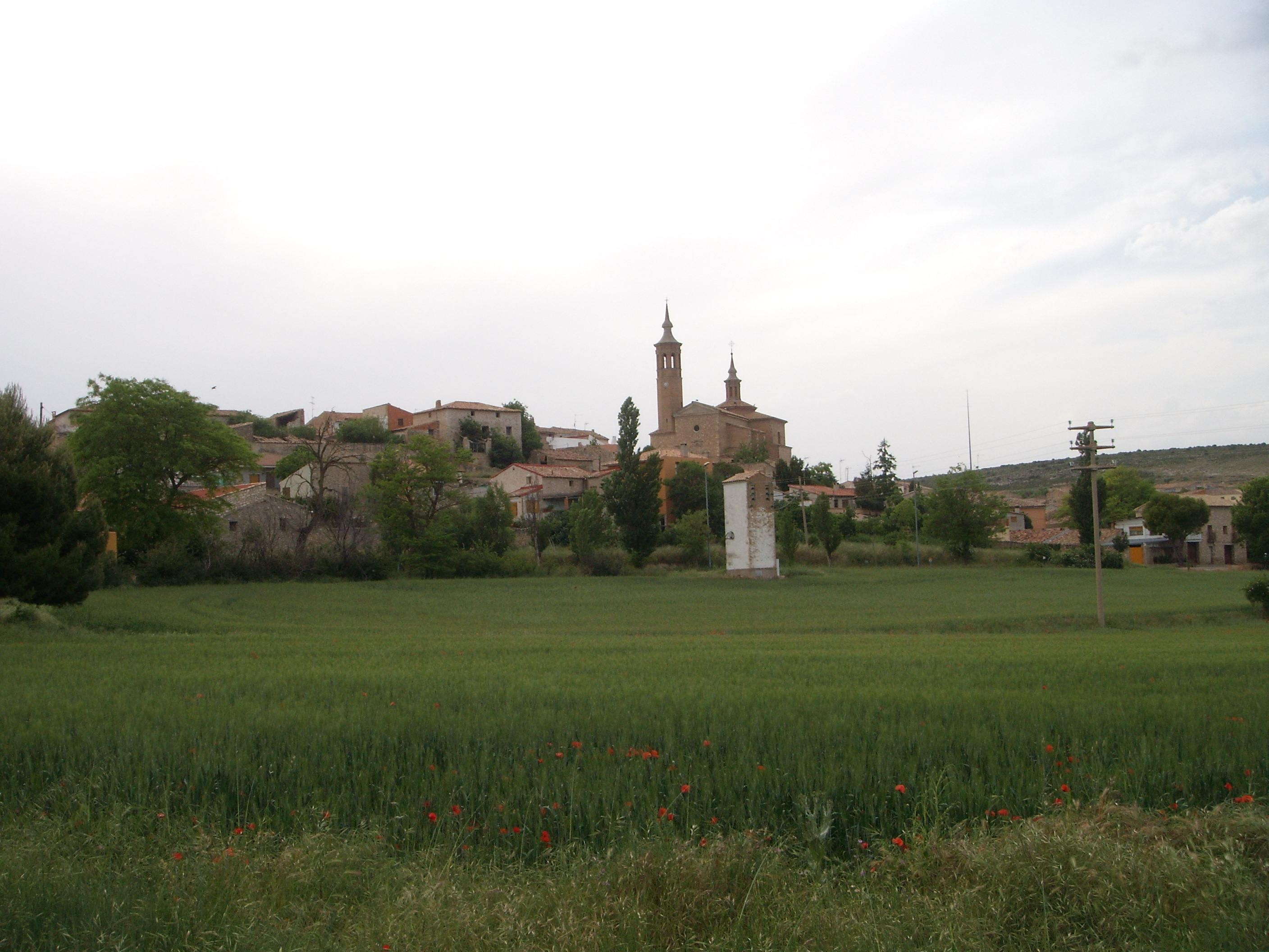 Vista parcial de Fuendetodos